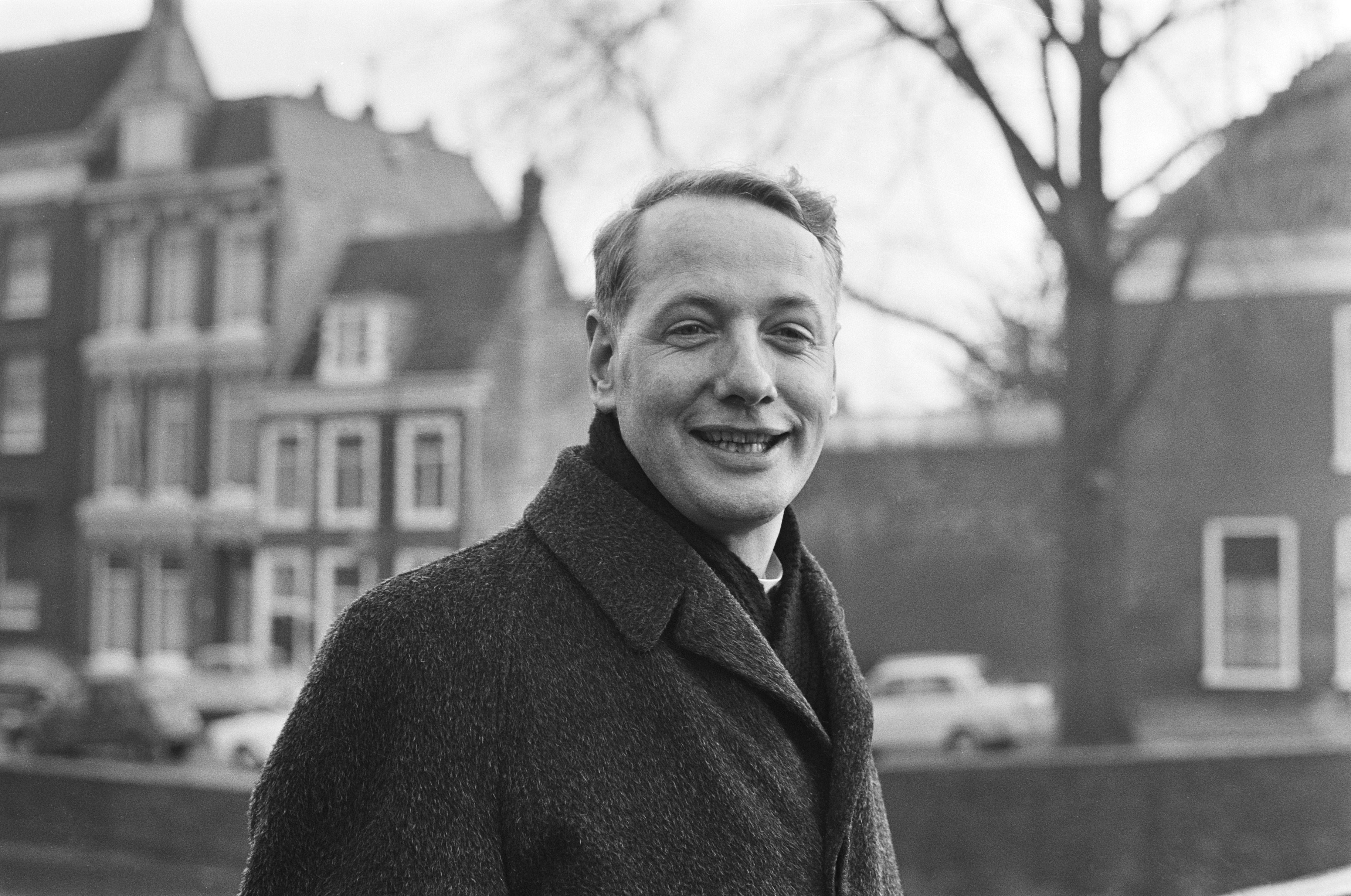 Bisschoppenvergadering over benoeming dr. Simonis, Haarlem; dr. Simonis, kop, na vergadering. Datum 11 januari 1971